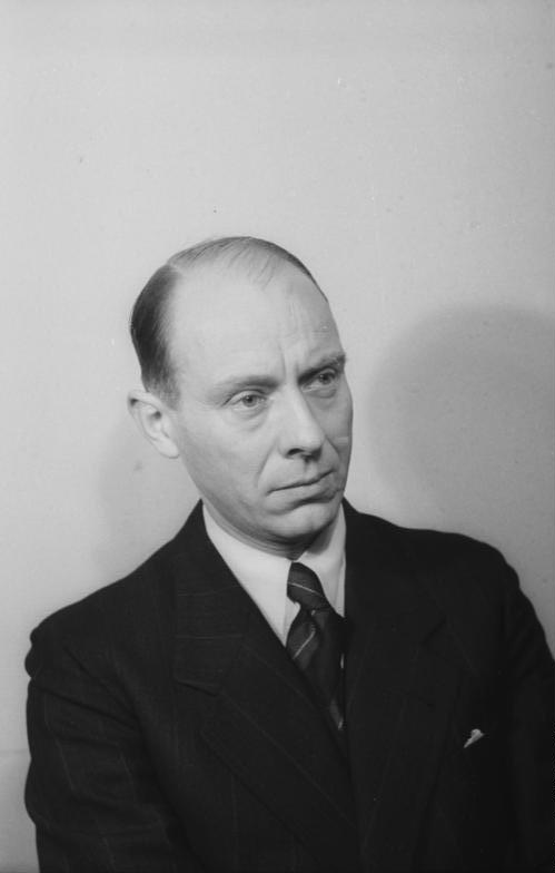 Präsident des Obersten Gerichtshofes. Kurt Schumann, der Präsident des Obersten Gerichtshofes der Deutschen Demokratischen Republik, wurde am 7.12.1949 auf der 6. Tagung der Volkskammer gewählt. Schumann war bisher Oberrichter in Erfurt. Er ist am 29.4.1908 geboren. Aufn.: Illus-Heilig/7.12.1949